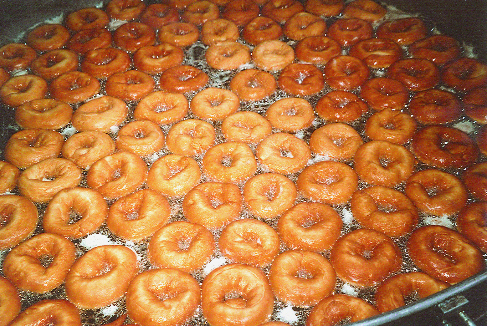 Ciambelle dolci di Patate Rosse di Colfiorito durante la frittura